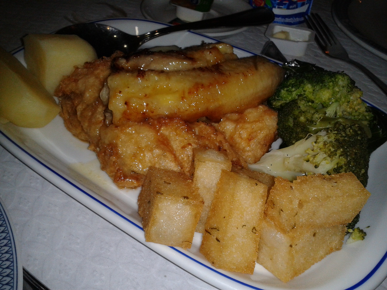 Espada com banana e milho frito, da Madeira.